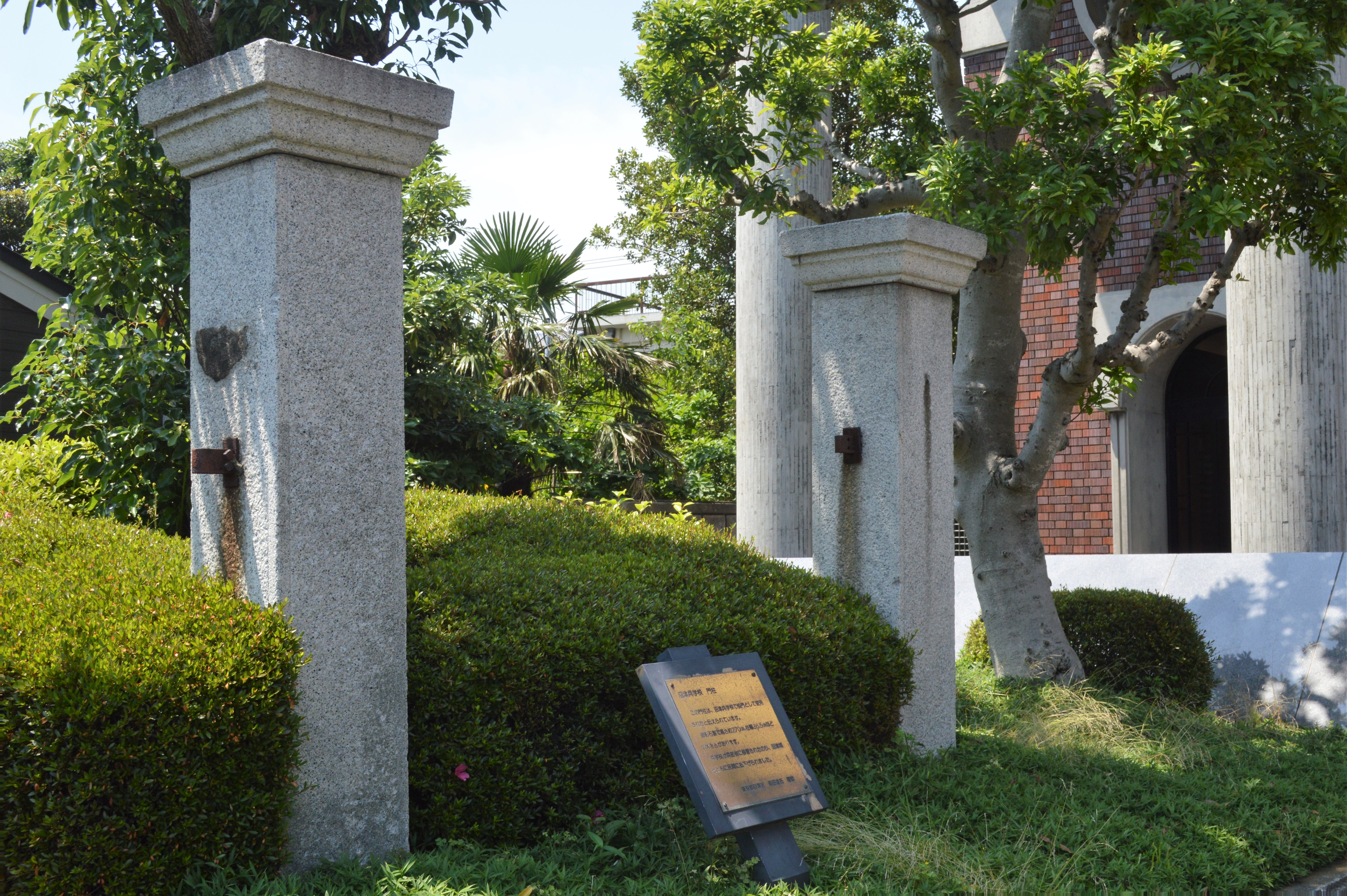 静岡県沼津市にある沼津市明治史料館。沼津兵学校の校門。